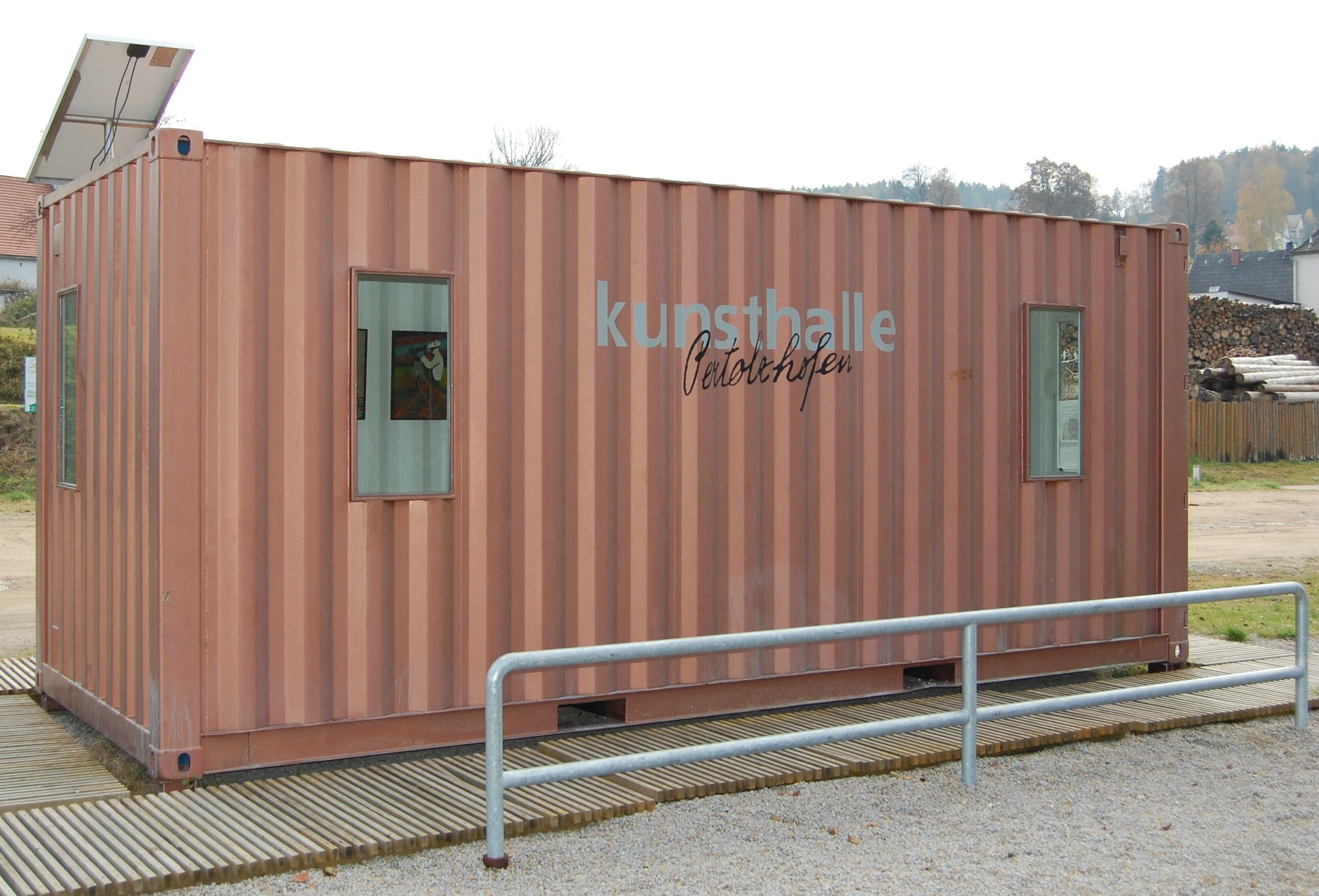 "Kunsthalle" in Pertolzhofen